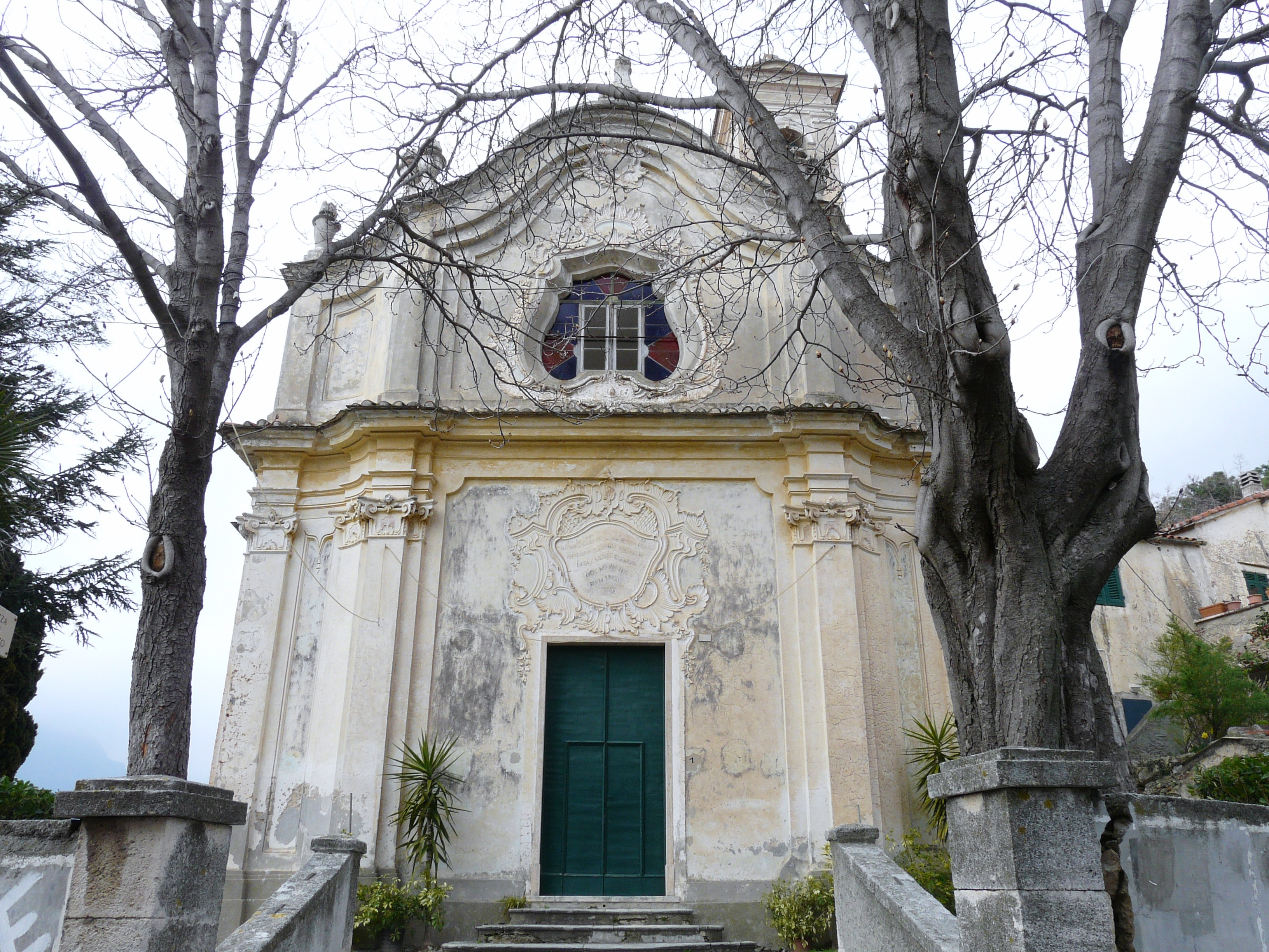 Chiesa di San Lorenzo, Rialto, Liguria, Italia